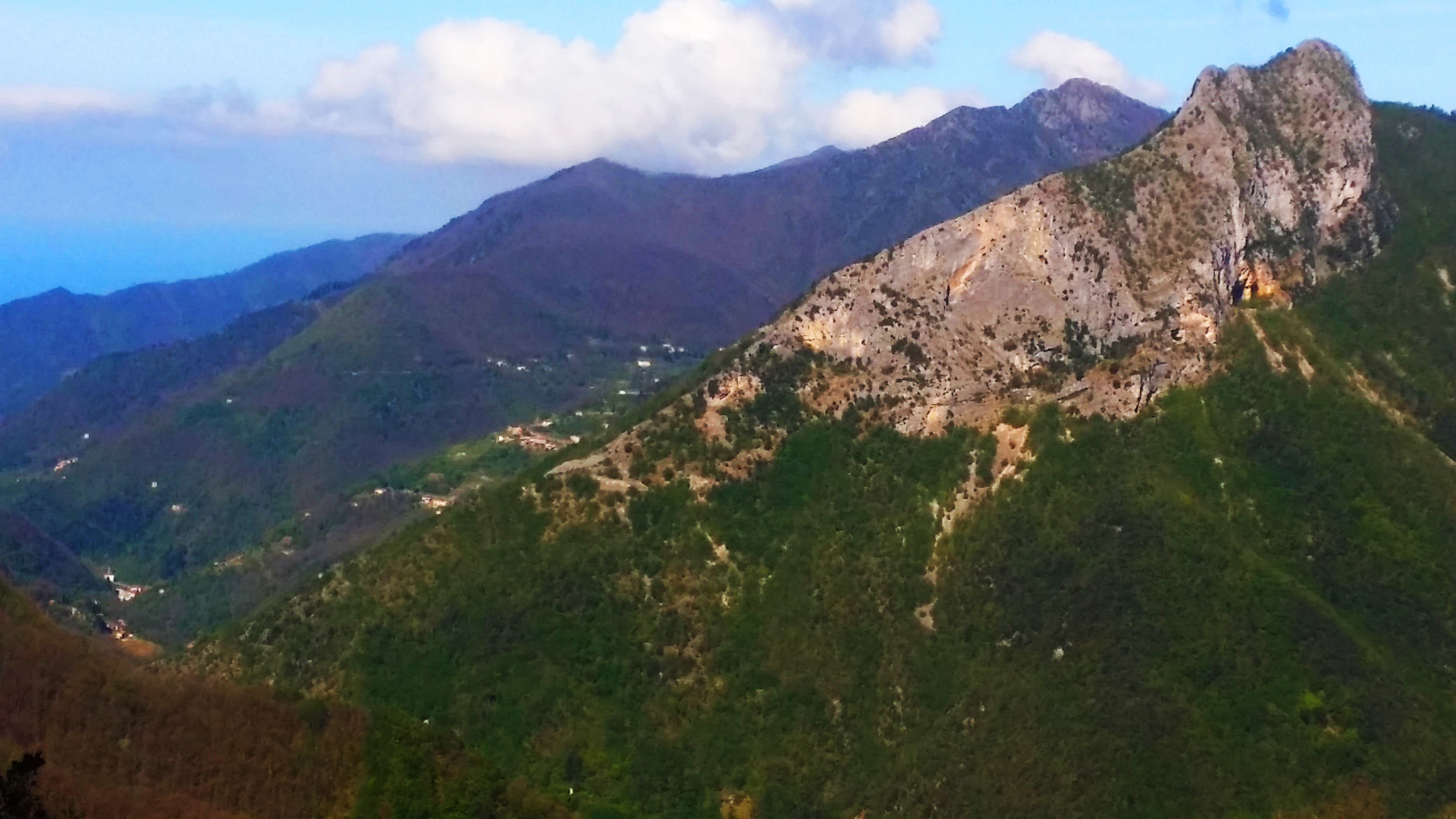 Il monte Montalto fotografato da Stazzema. Il monte appartiene a Retignano e in parte a Volegno. I due paesi lo sfruttarono per il marmo.